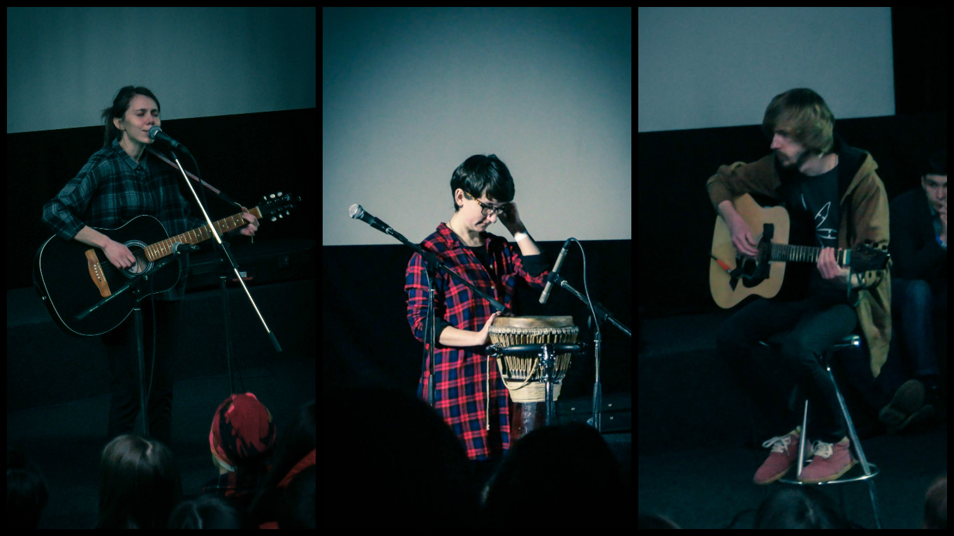 Тур 2016 року, Черкаси.